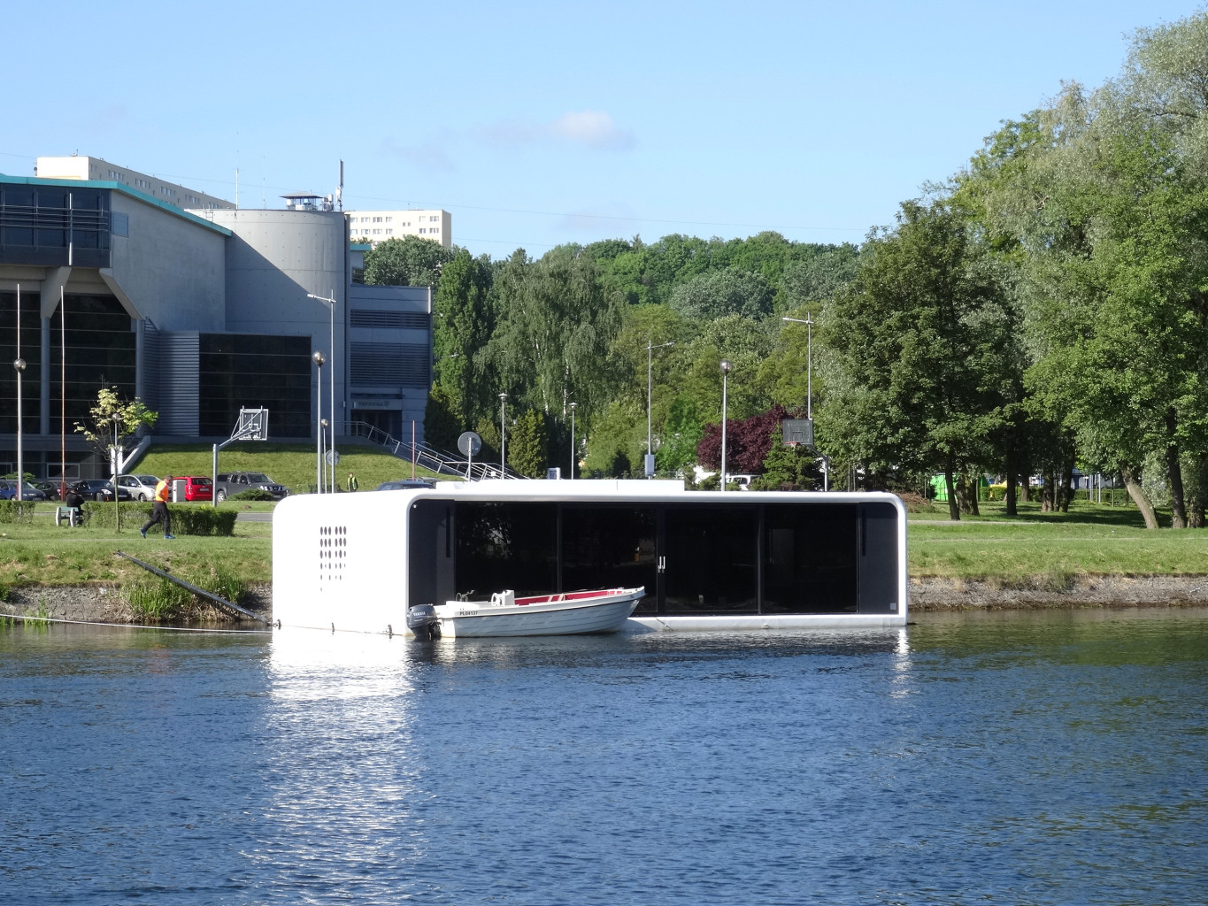 Dom na wodzie na Brdzie przed halą Łuczniczka w Bydgoszczy